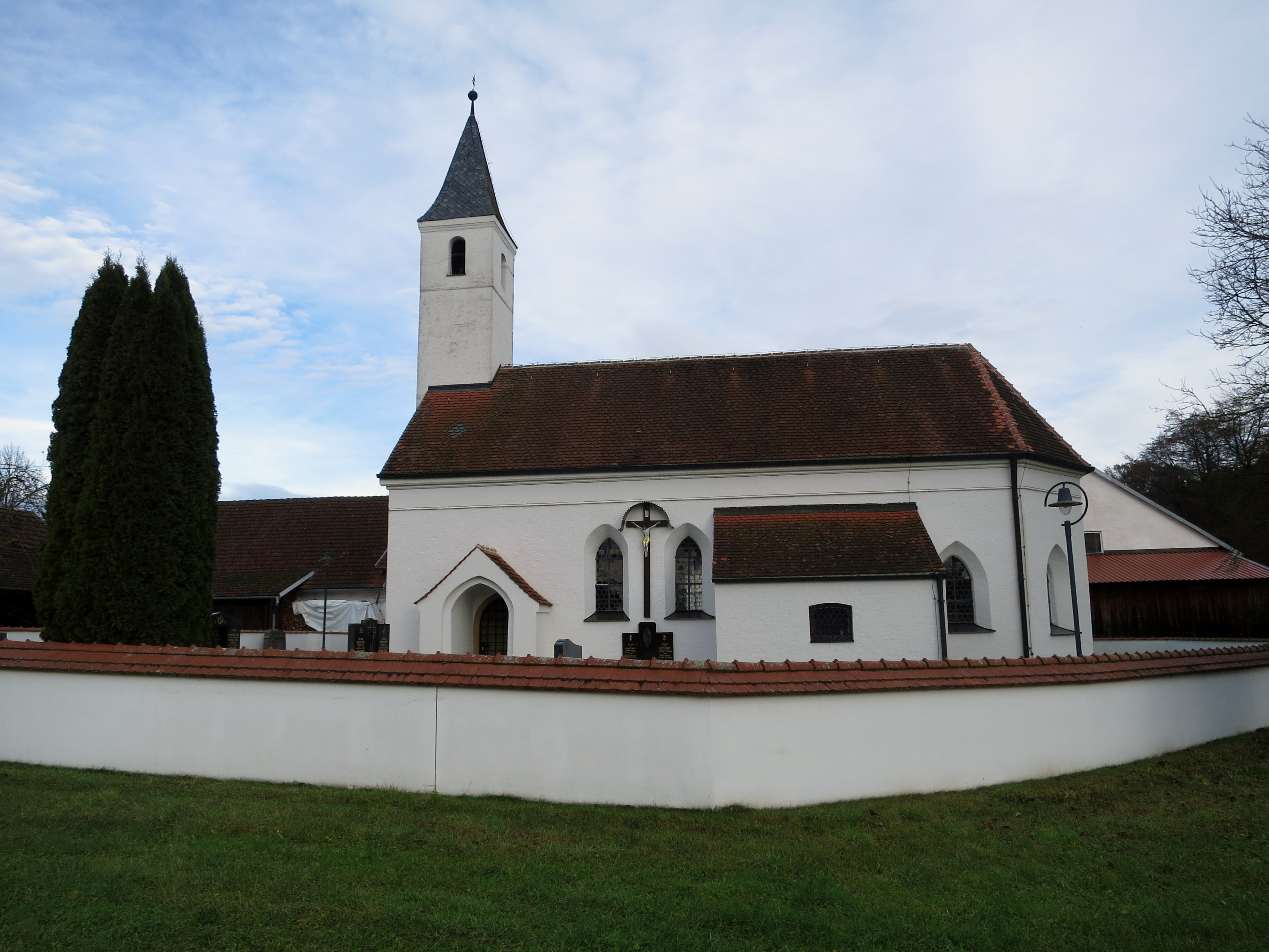 Gotischer Saalbau aus dem 15. Jahrhundert